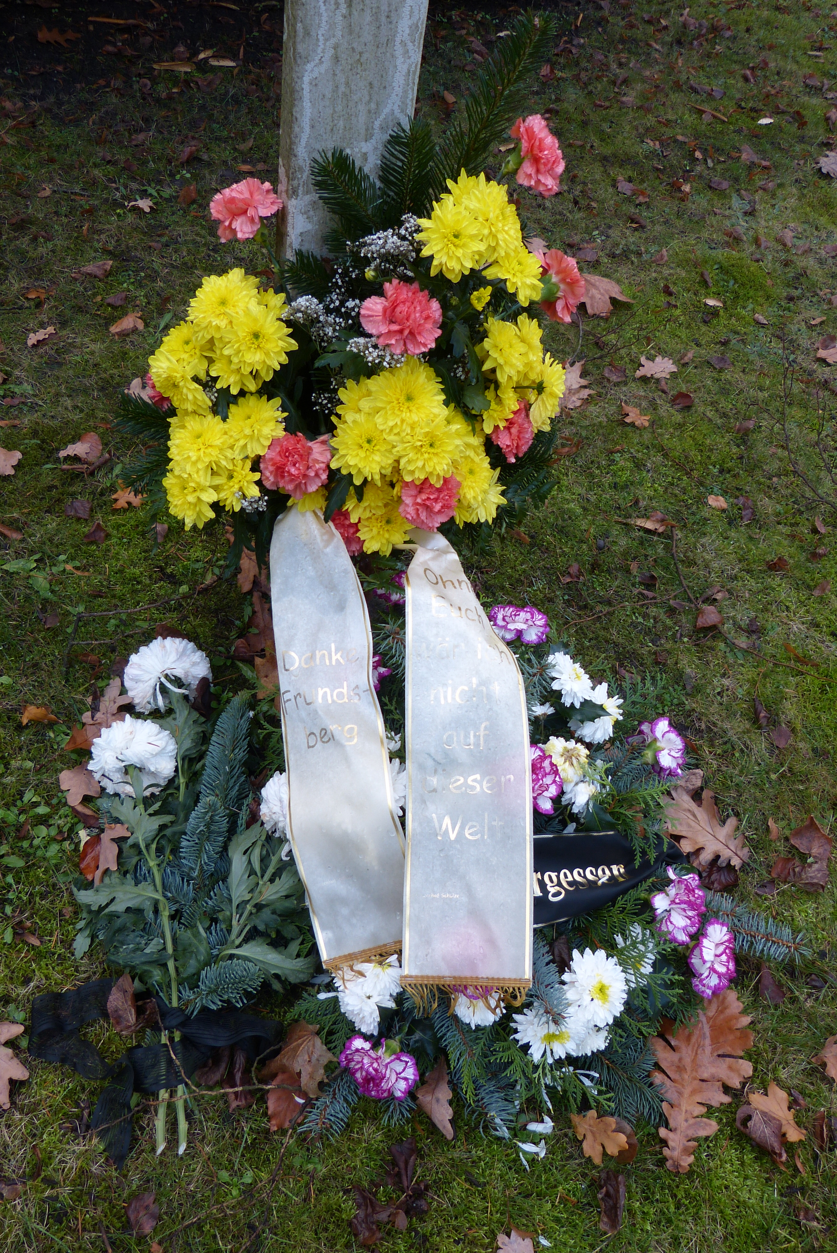 Blumengebinde auf dem Deutschen Soldatenfriedhof in Spremberg. Aufschrift: Danke Frundsberg Ohne Euch wäre ich nicht auf dieser Welt (über die Hintergründe dieser Aufschrift ist leider nichts bekannt)